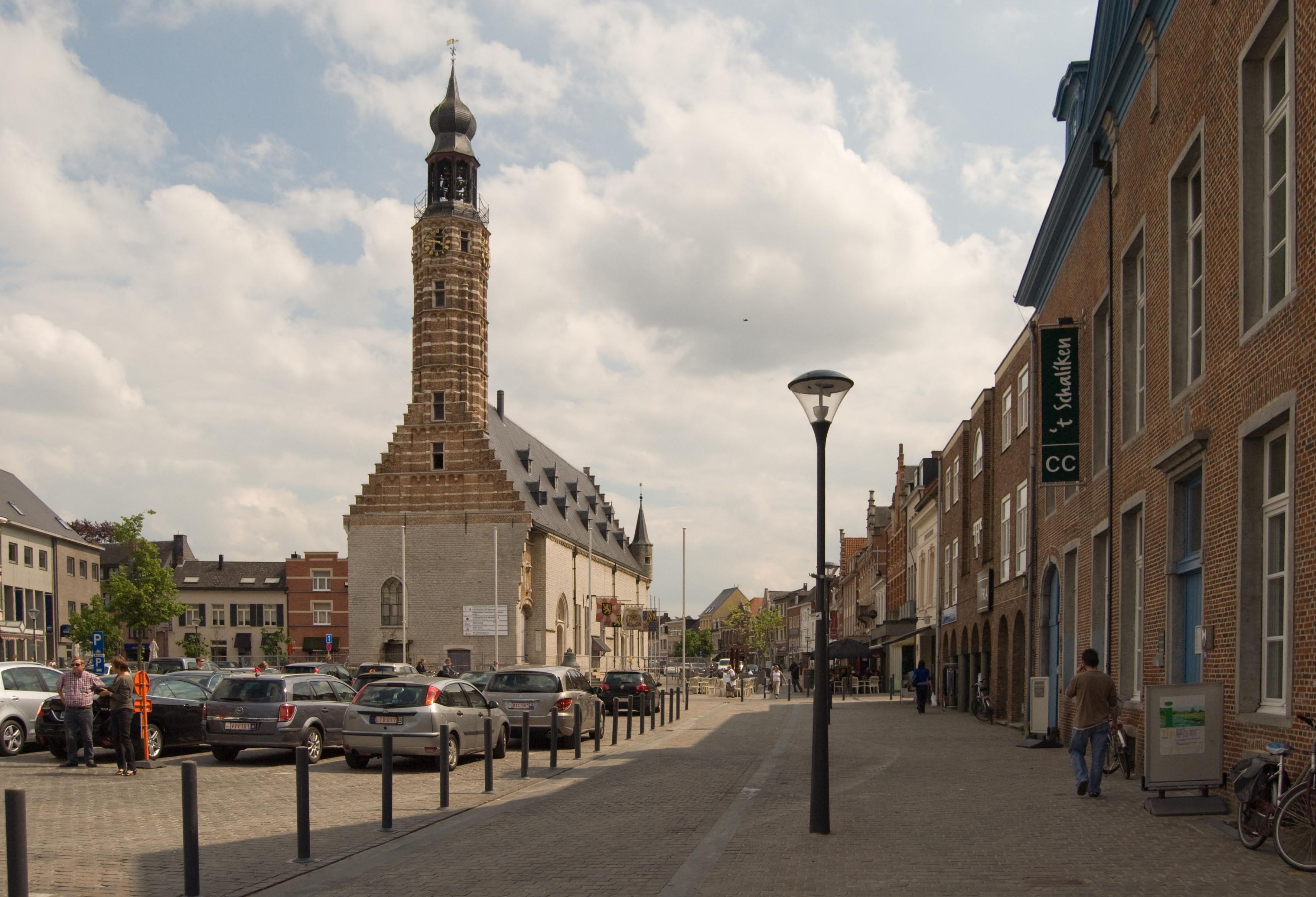 Lakenhal, Belfort en Cultuurcentrum